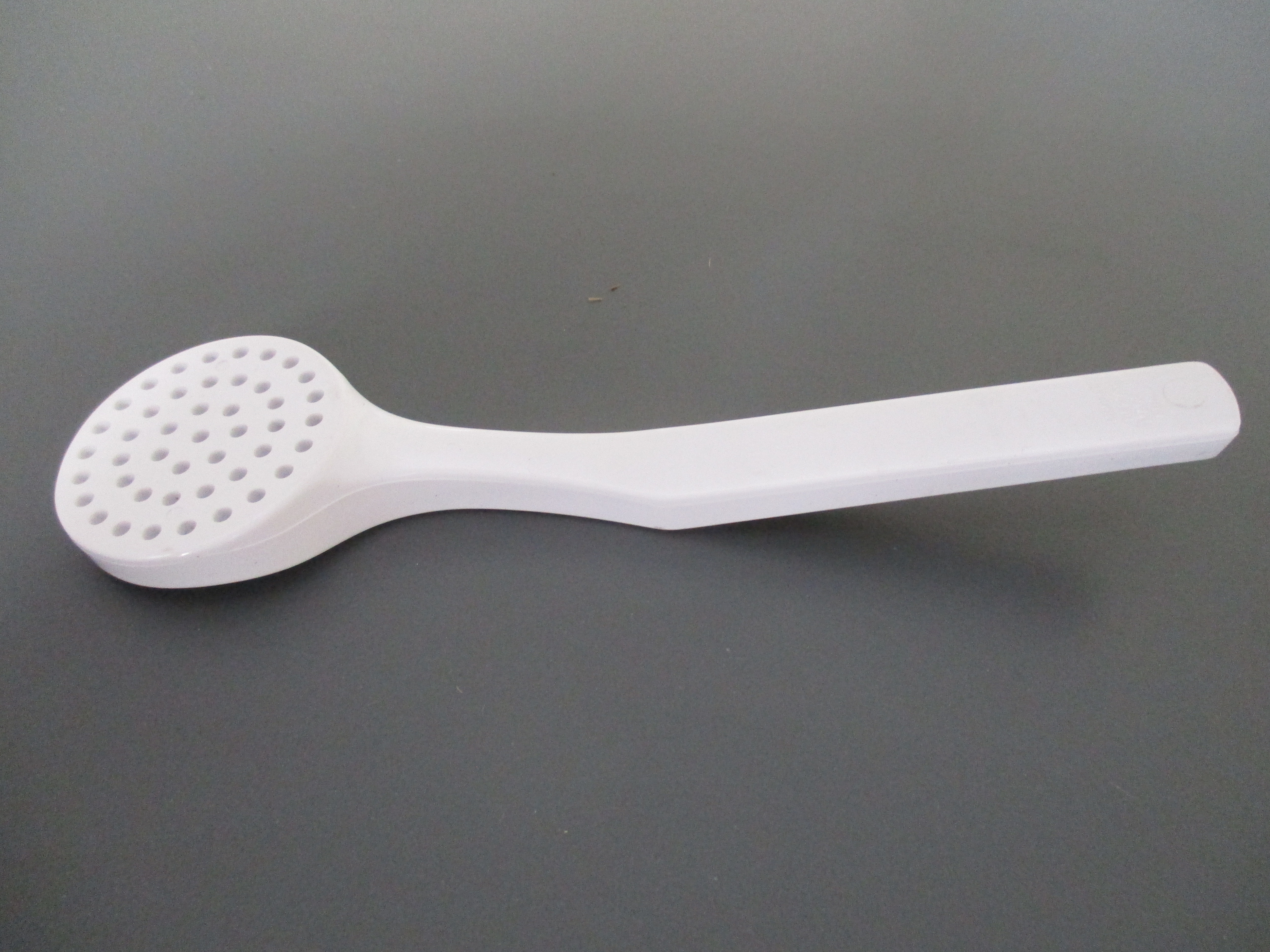 Monture en plastique, percée, de brosse de massage facial avant empoilage (La Brosserie Française)